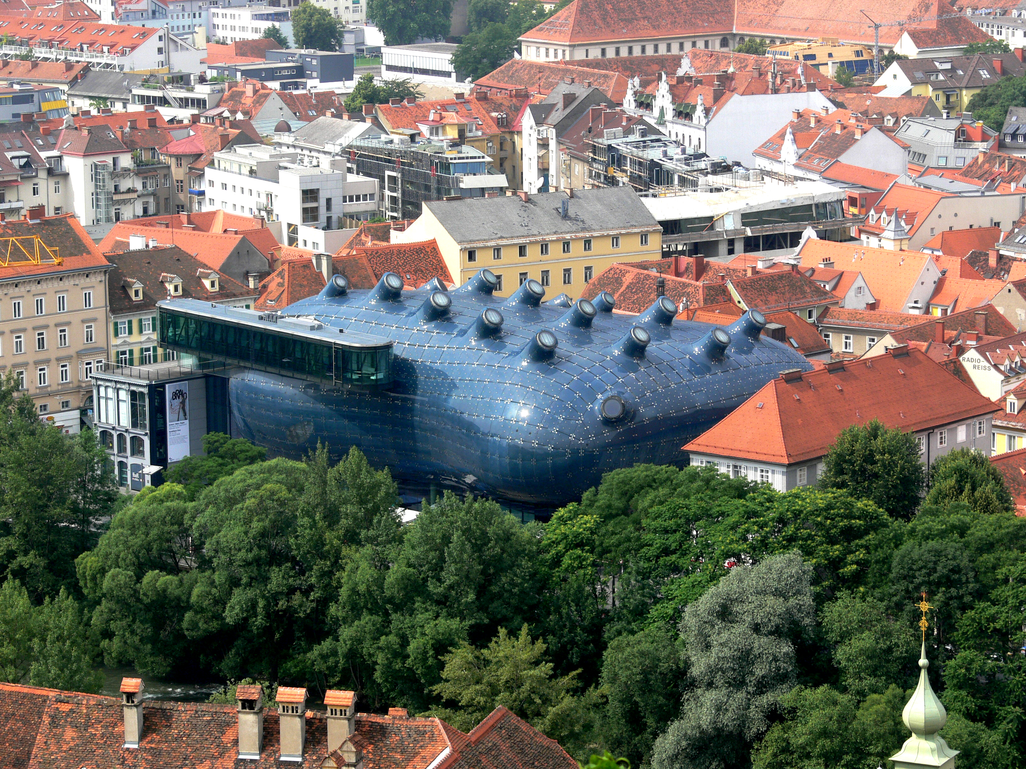 Kunsthaus Graz, gesehen vom Schlossberg